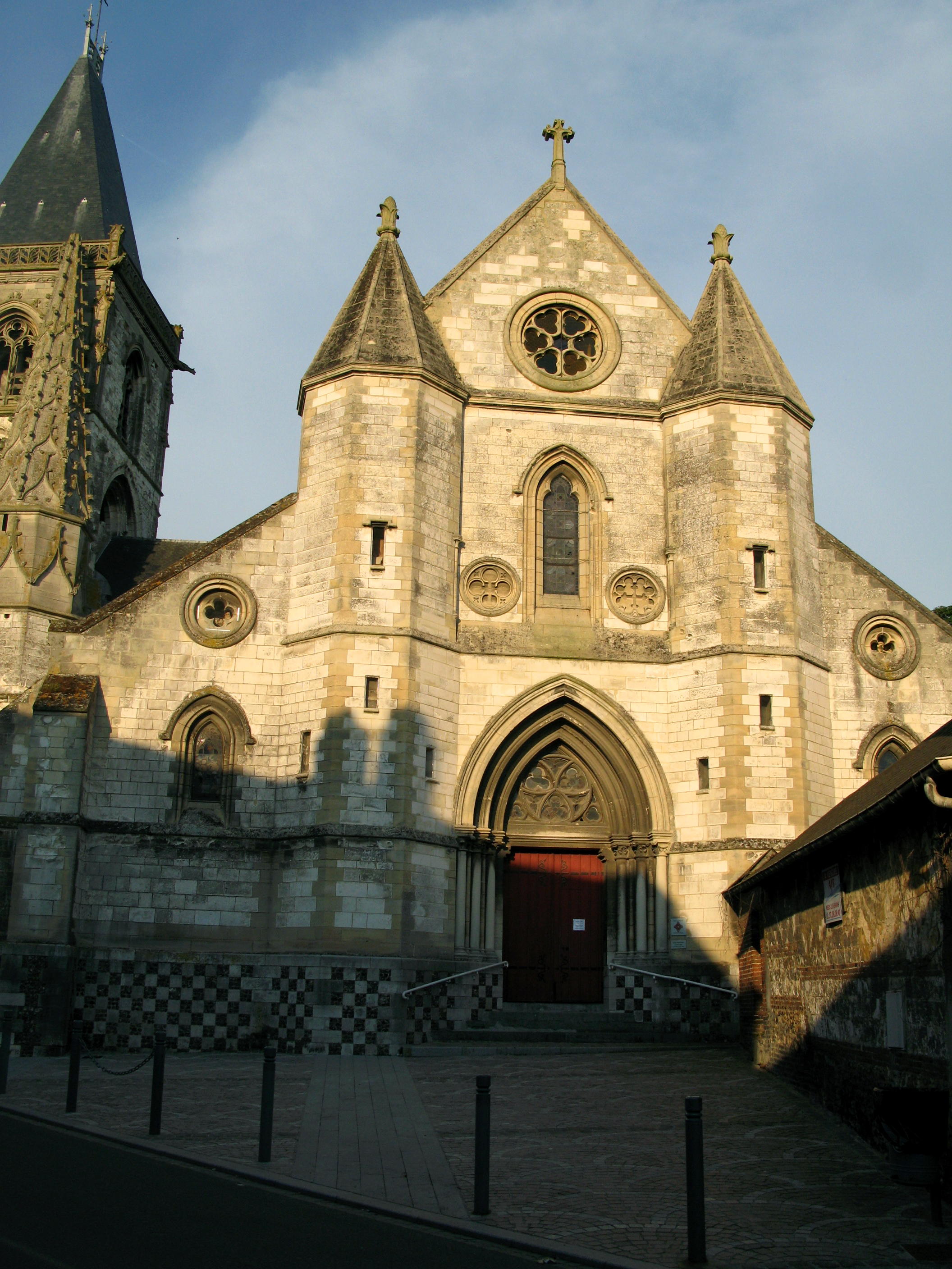 Gamaches (Somme, France) - L'église. .